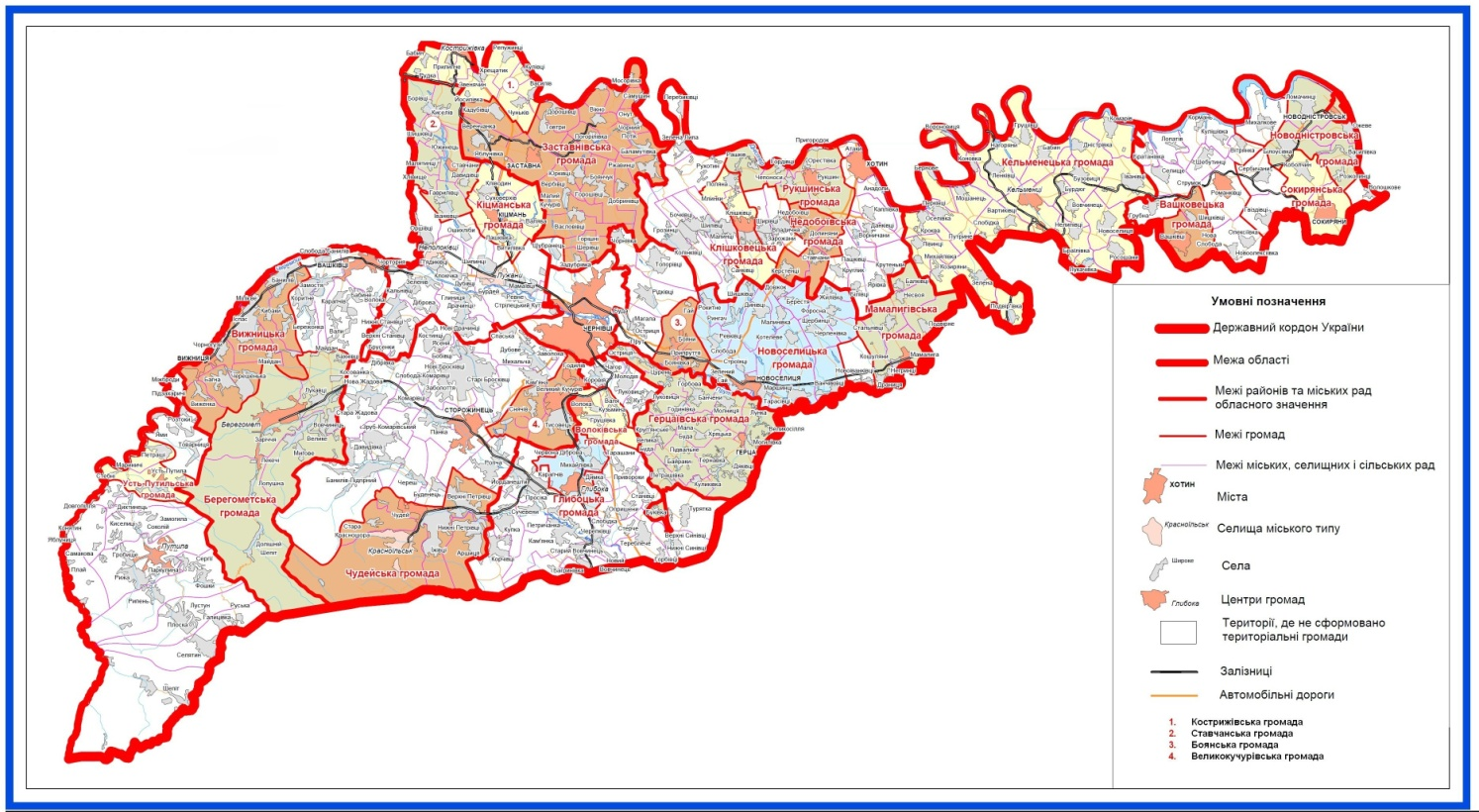 Перспективний план формування громад Чернівецької області